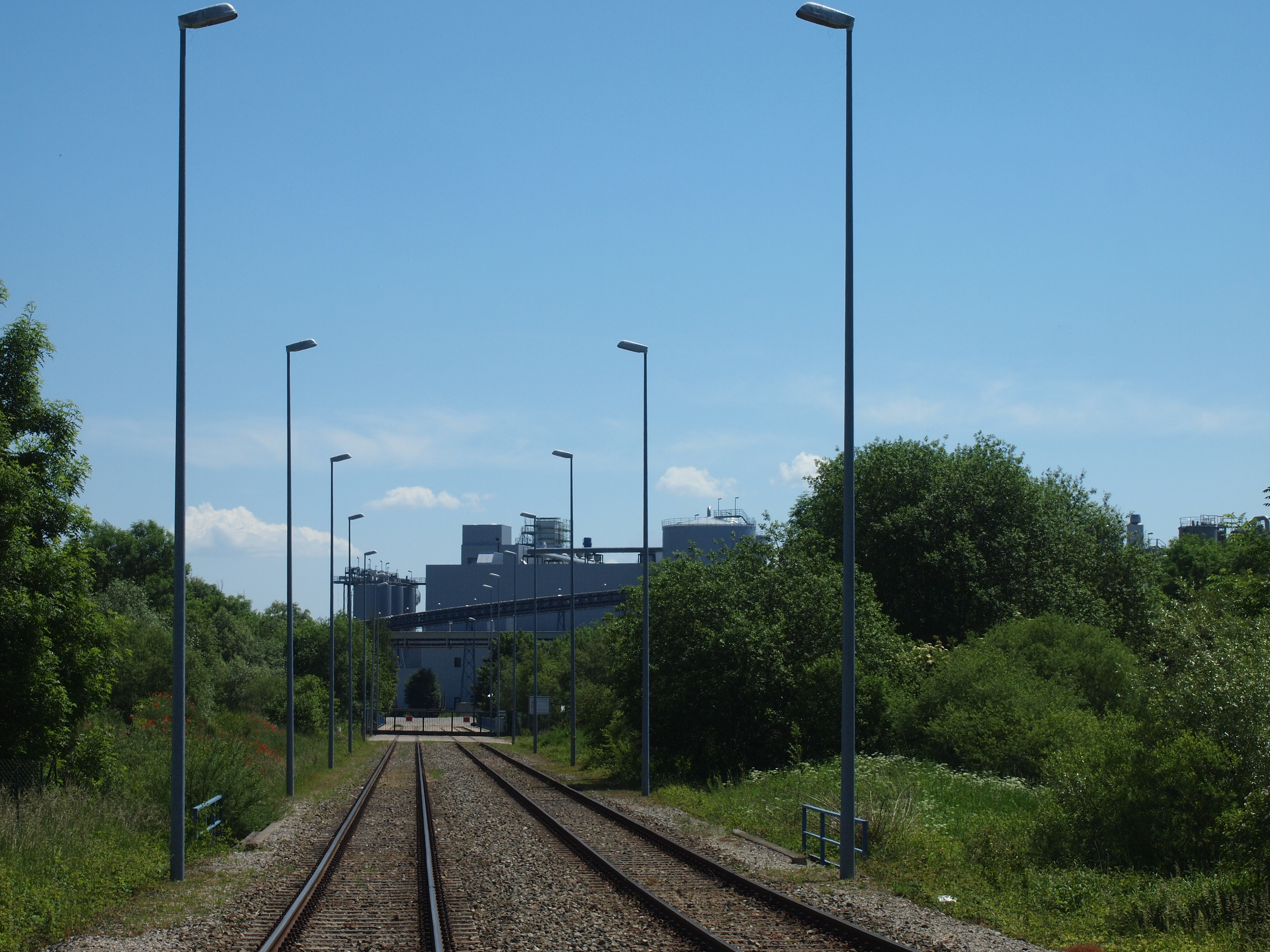 UPM Ettringen, Weiche zum zweigleisigen Gleisanschluss der Papierfabrik als Abzweig der Staudenbahn hinter Ettringen